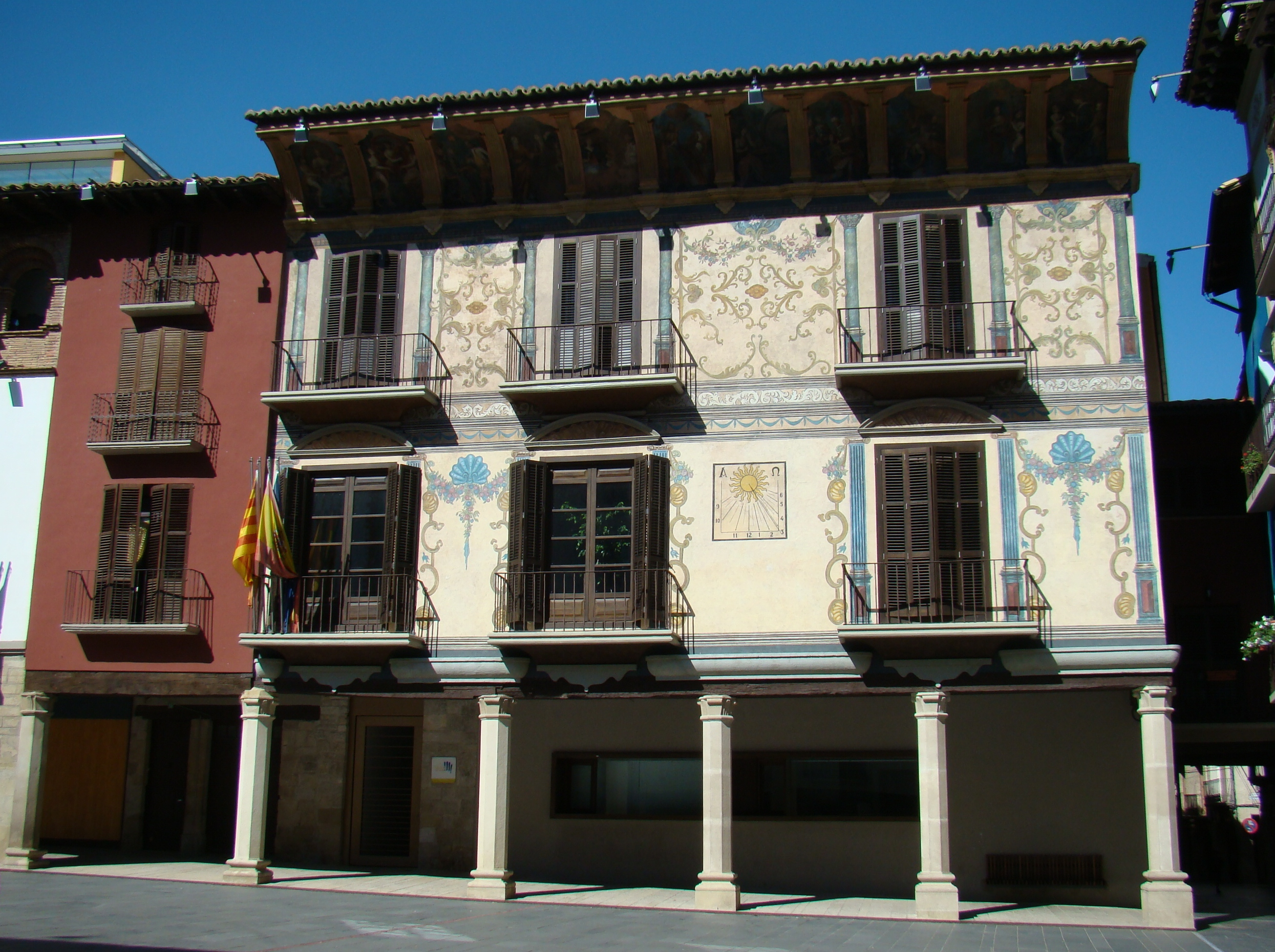 RI-53-0000198